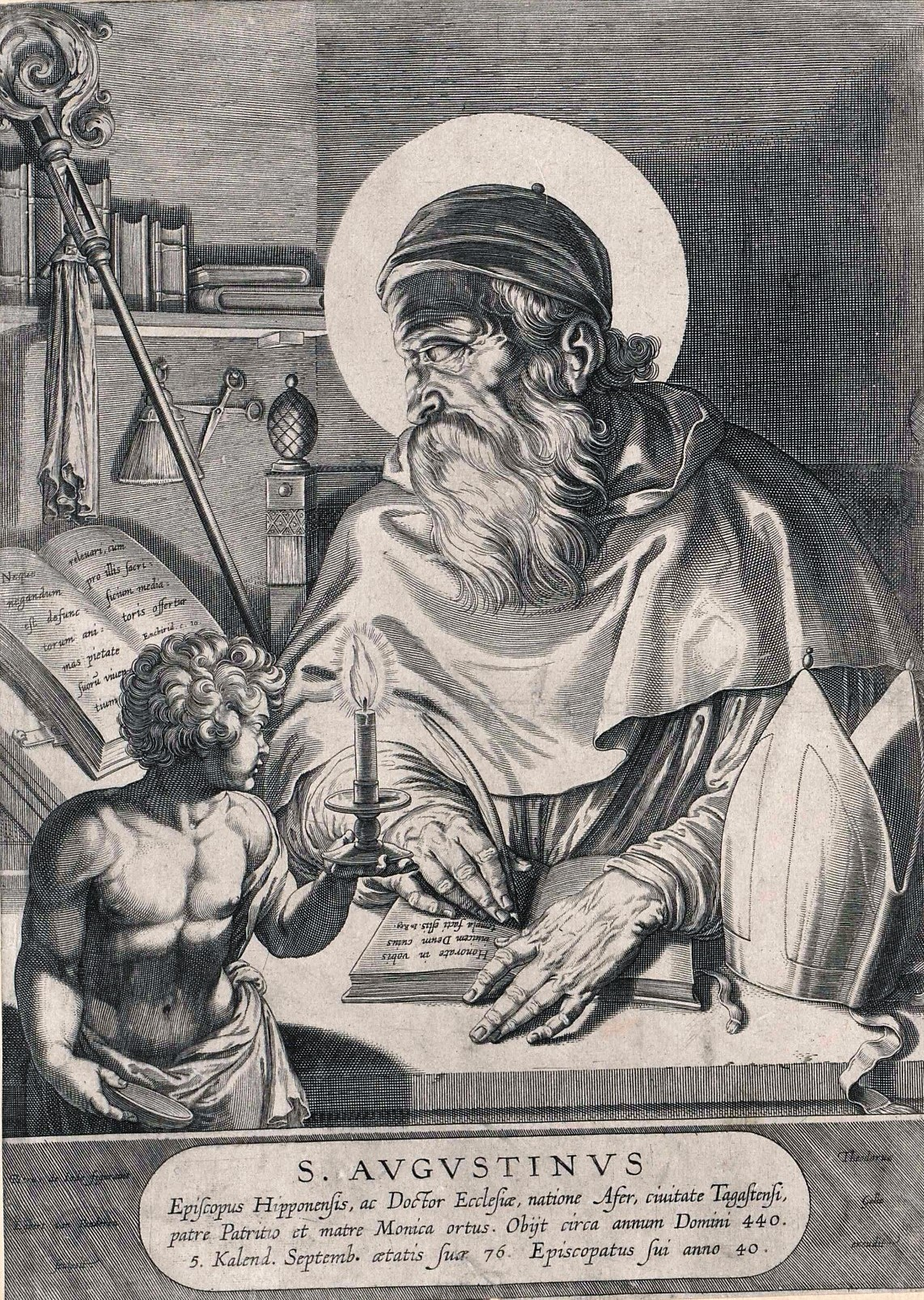 Augustinus von Hippo, Heiliger (354 - 430)